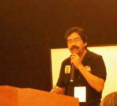 Juan Ignacio Suárez Huape hablando en un congreso del Partido de la revolución Democrática